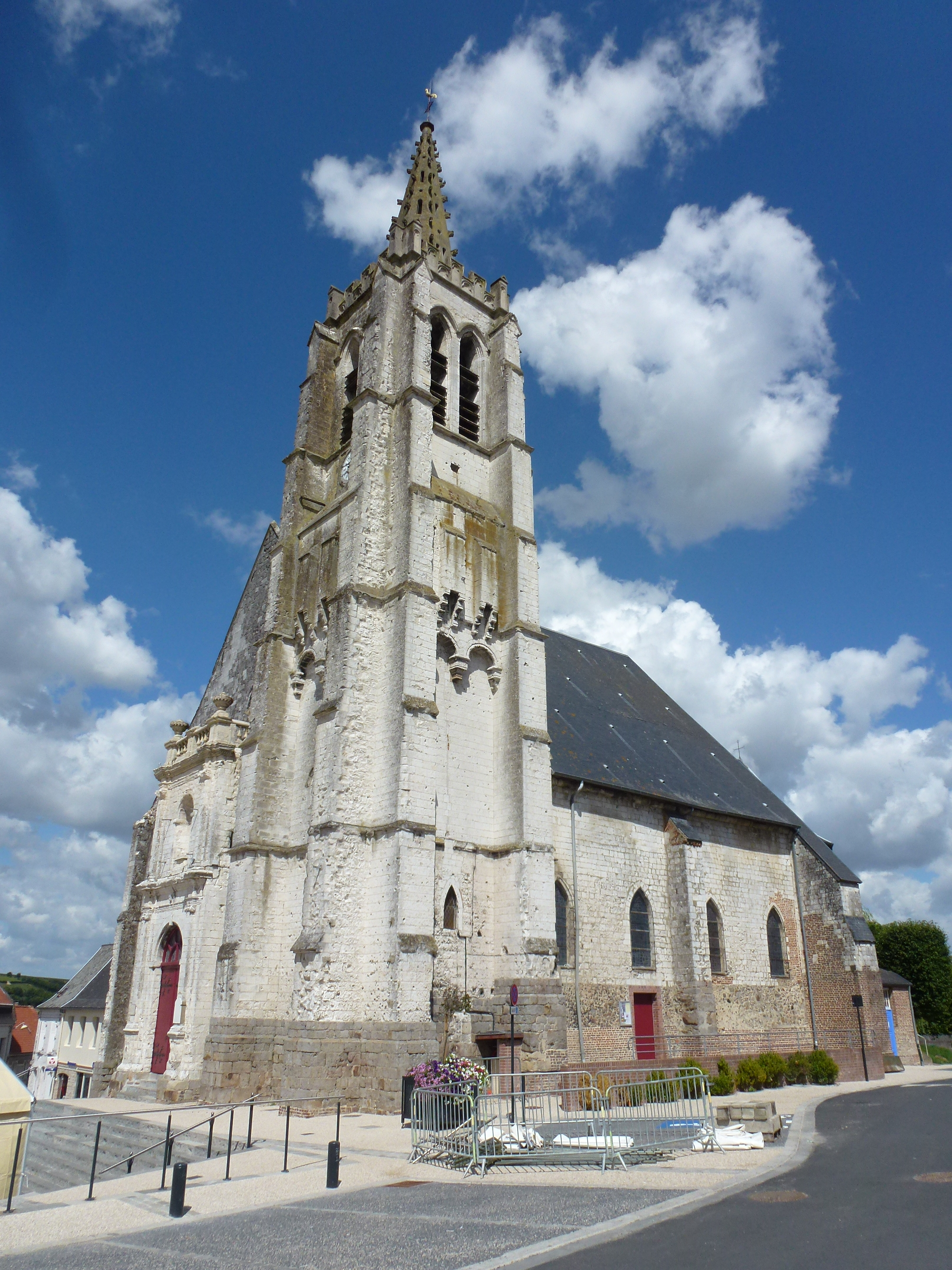 Fauquembergues (Pas-de-Calais, Fr) église Saint-Léger PA00108276 .